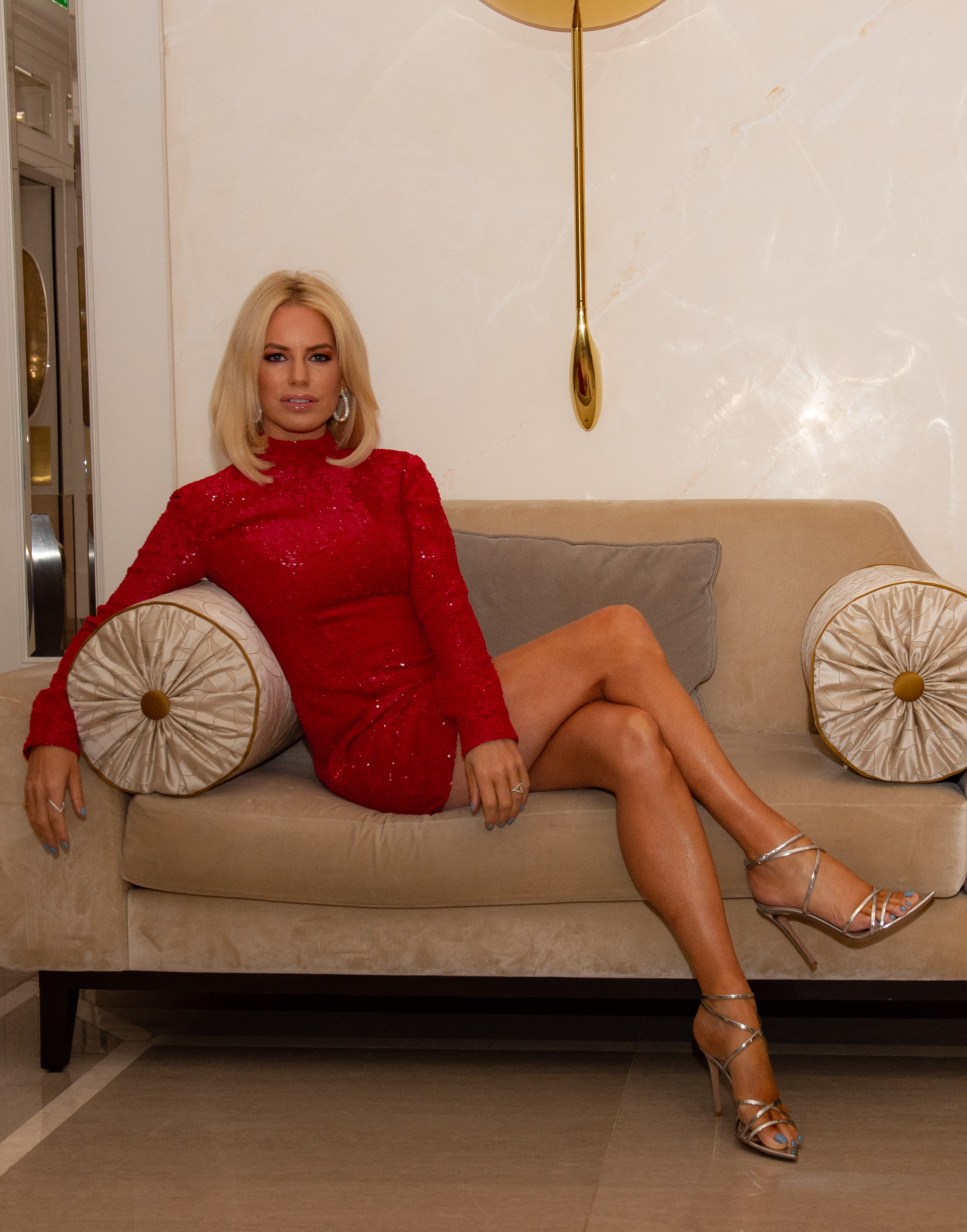 Caroline Stanbury lors de son événement Cash & Rocket dans les salons du mythique Hotel de Paris de Monaco